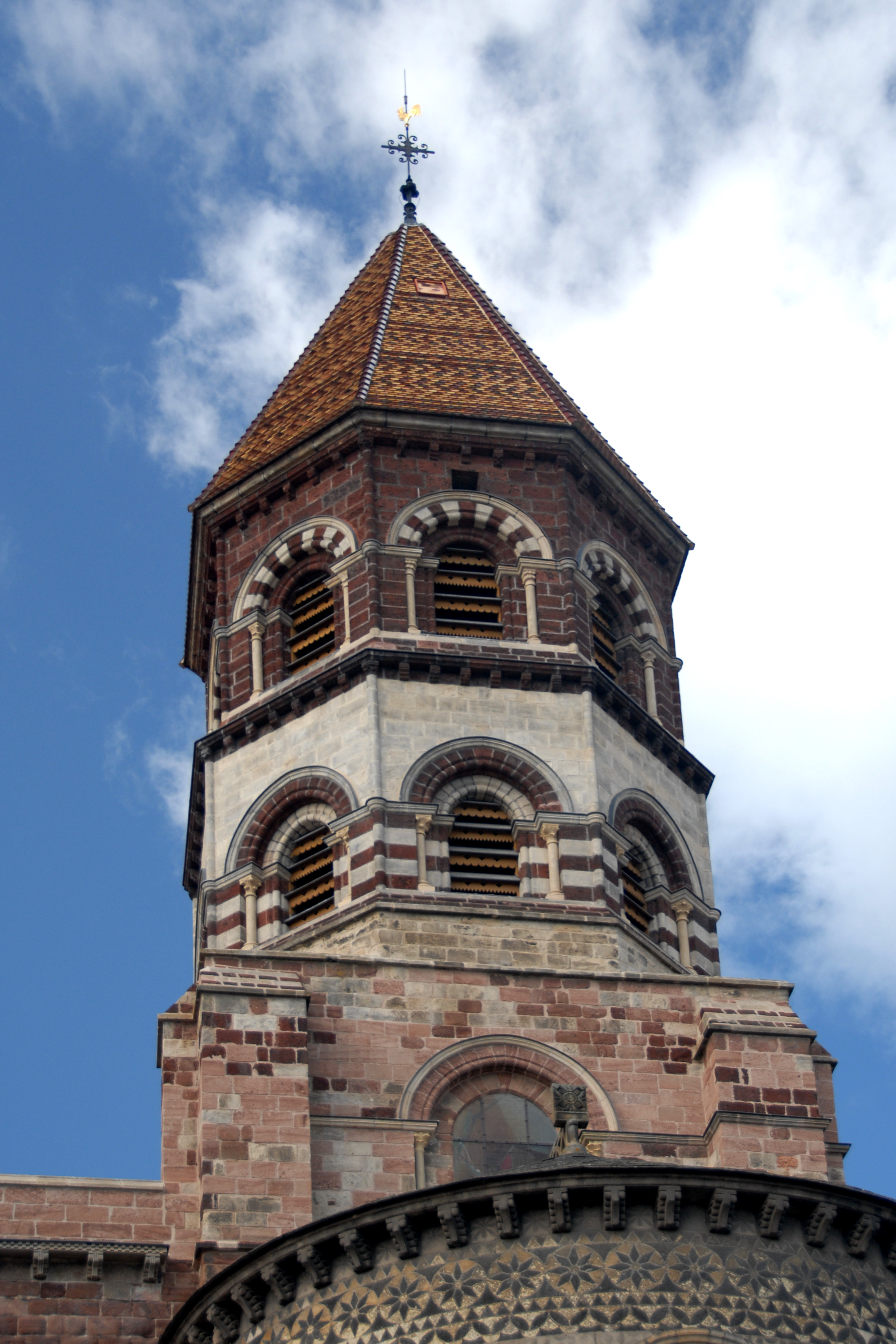 St.-Julien Brioude, Vierungsturm von O